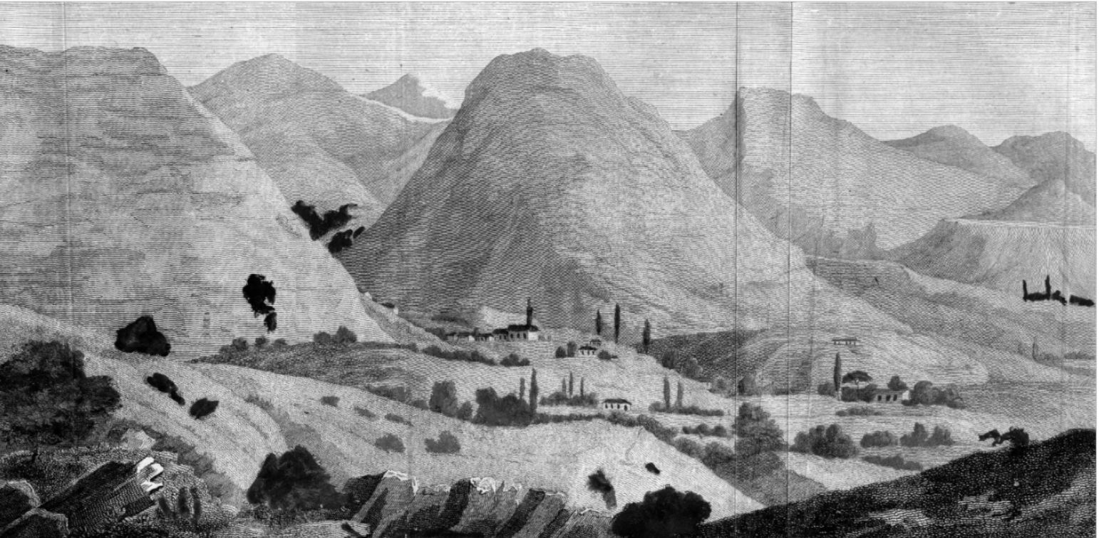 Лист из альбома ко второй части издания П.И.Сумарокова «Досуги крымского судьи или Второе путешествие в Тавриду».